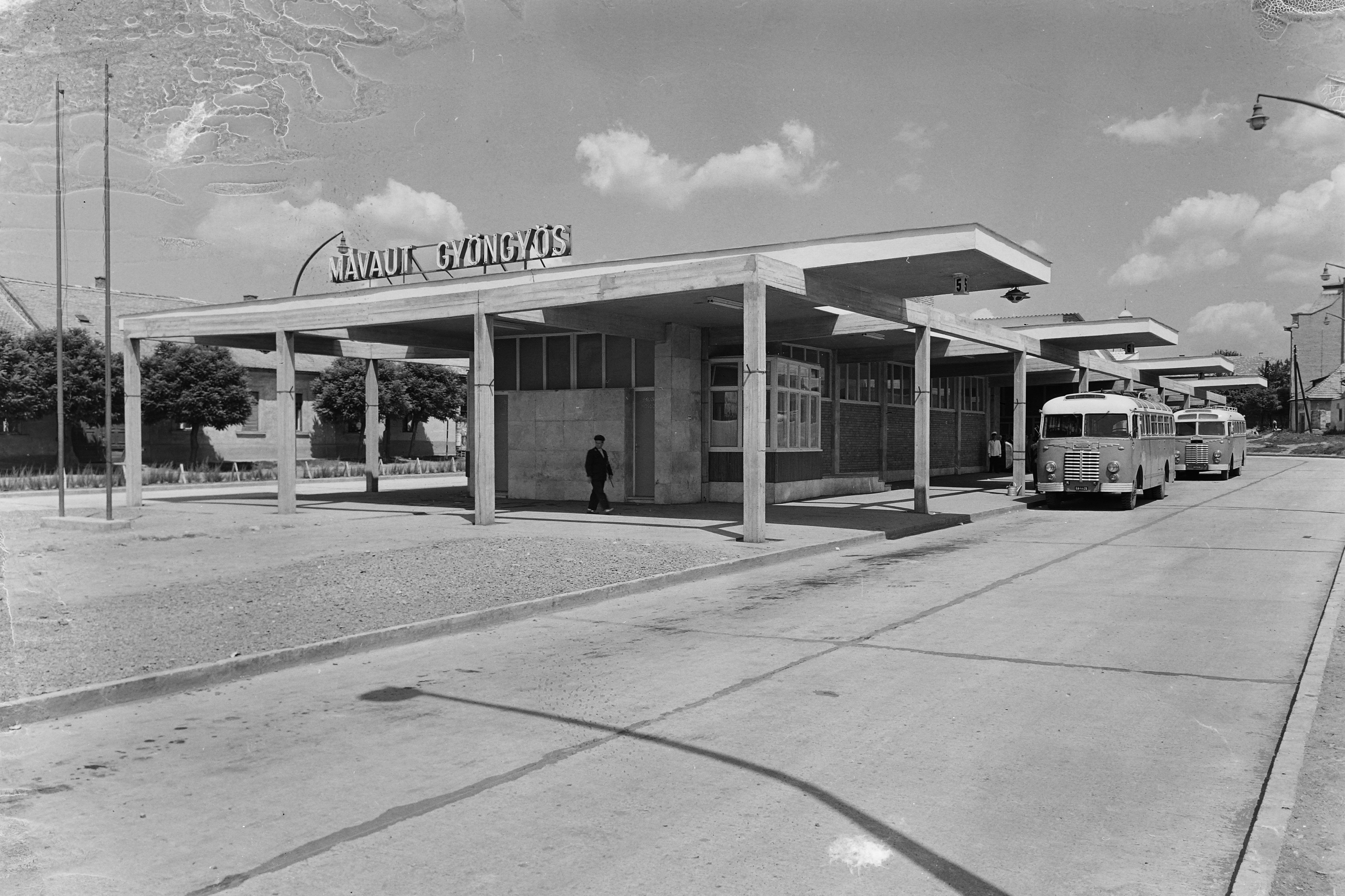 Koháry út (Április 4. körút), autóbusz-pályaudvar. Location: Hungary, Gyöngyös Tags: bus terminal, bus stop Title: Koháry út (Április 4. körút), autóbusz-pályaudvar.